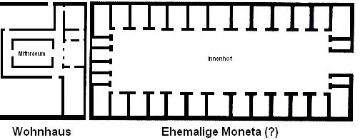 Schematische Darstellung der antiken Gebäude unter San Clemente in Rom